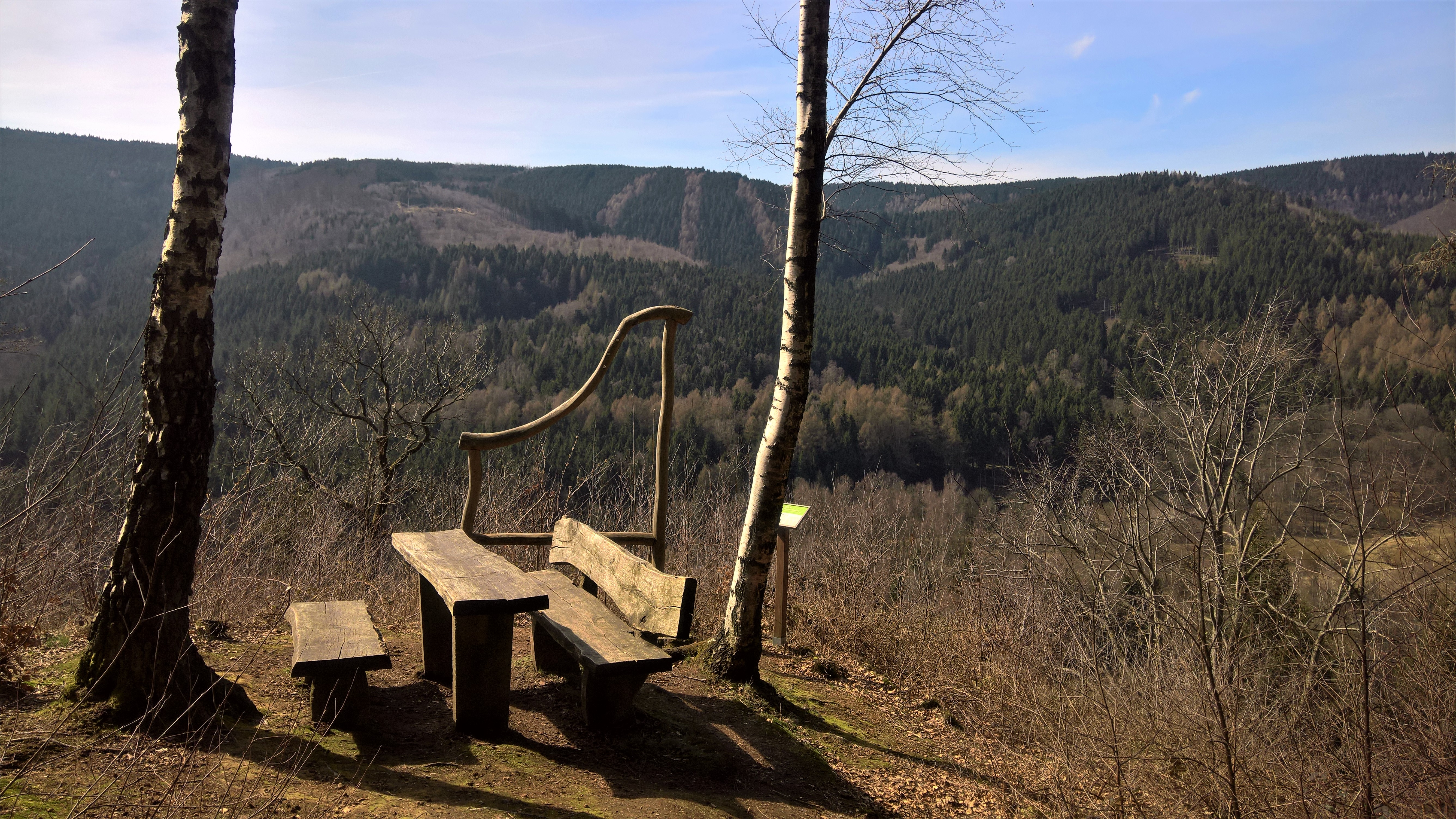 Aussichtspunkt Mandolinenhütte am Steinway-Trail, Lautenthal, Stadt Langelsheim, Landkreis Goslar